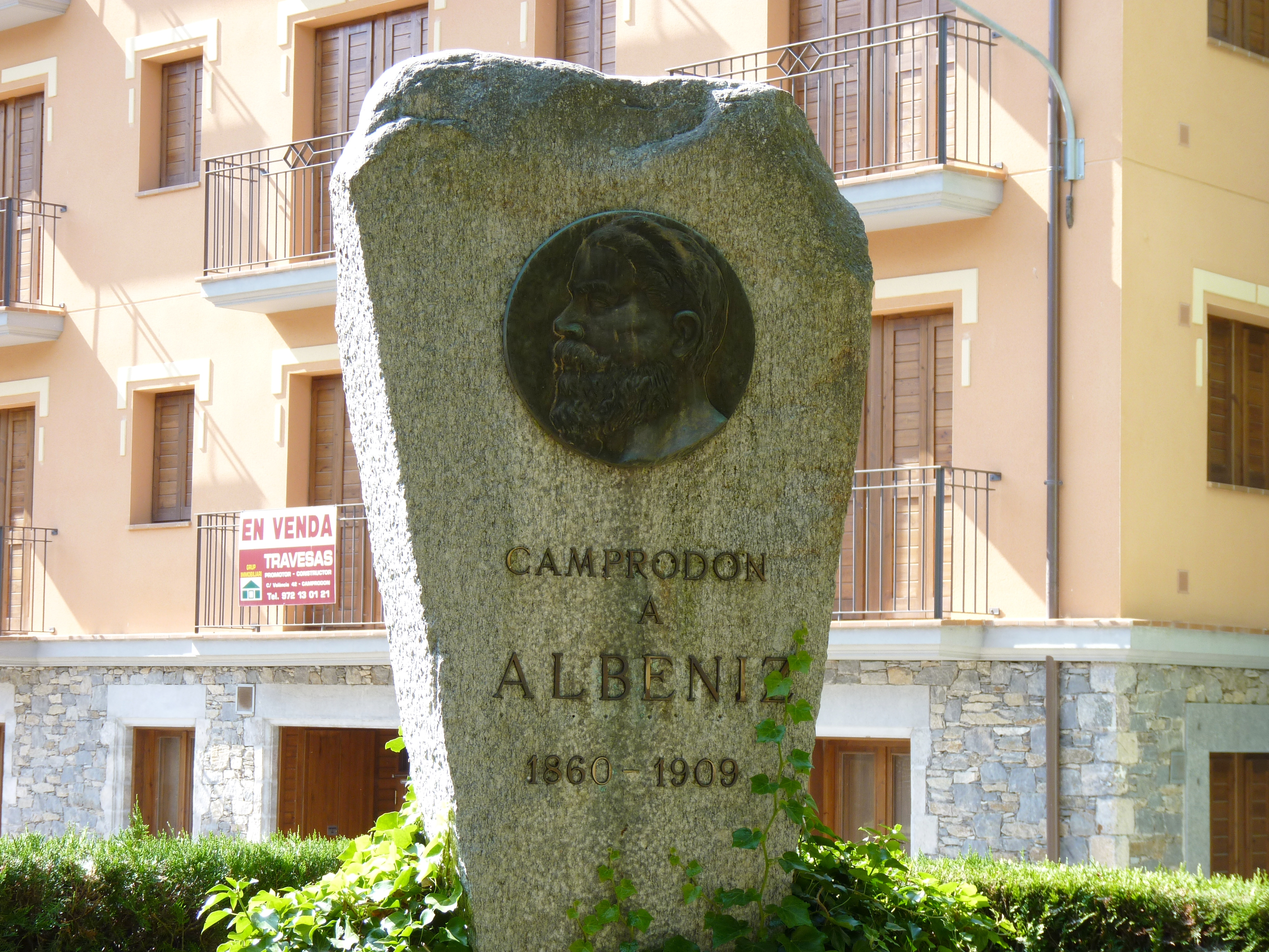 Monument a Isaac Albéniz, Camprodon (Ripollès, Girona, Catalunya, Espanya)